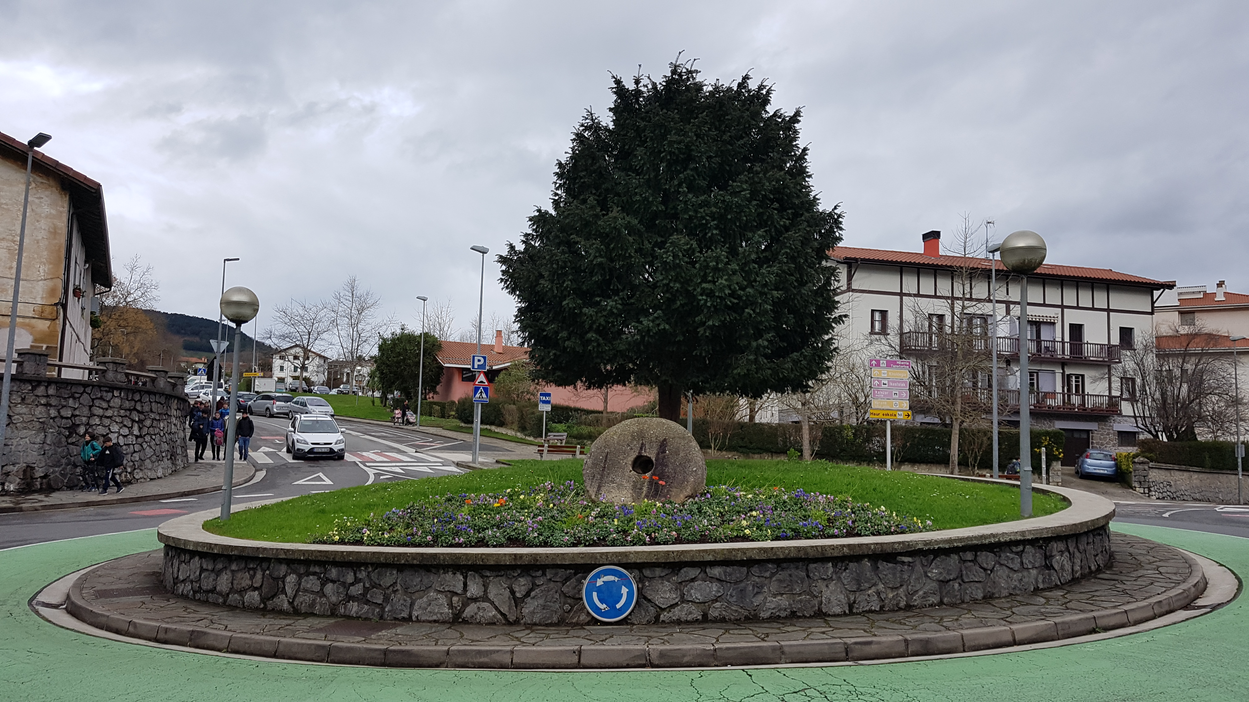 1997ko uholdeek Erroizpeko urtegi inguruetan eragindako kalteak ikusten ari zela Aldatsako Angelek errotarri bat aurkitu zuen Igartzazabal baserriaren azpiko aldeko errekan. Errotarri hau tamaina handikoa zen eta osorik zegoen. Hurrengo egunetan kaxkarragoak eta osatu gabeak ere aurkitu zituen. Errotarria handik ateratzeko lehen saialdian ez zuten arrakastarik izan, Ingemarko kableek huts egin zietelako, baina bigarrenean Usurbilgo Udaletxeko langileek lortu zuten beren helburua eta Bordatxoko biribilgunera eraman zuten.